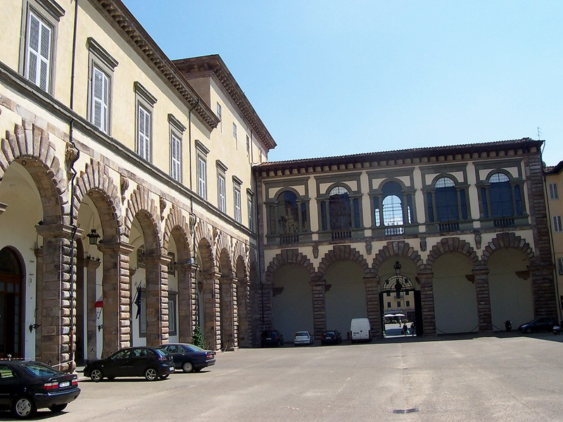 Lucca - Palazzo Ducale (cortile degli Svizzeri)